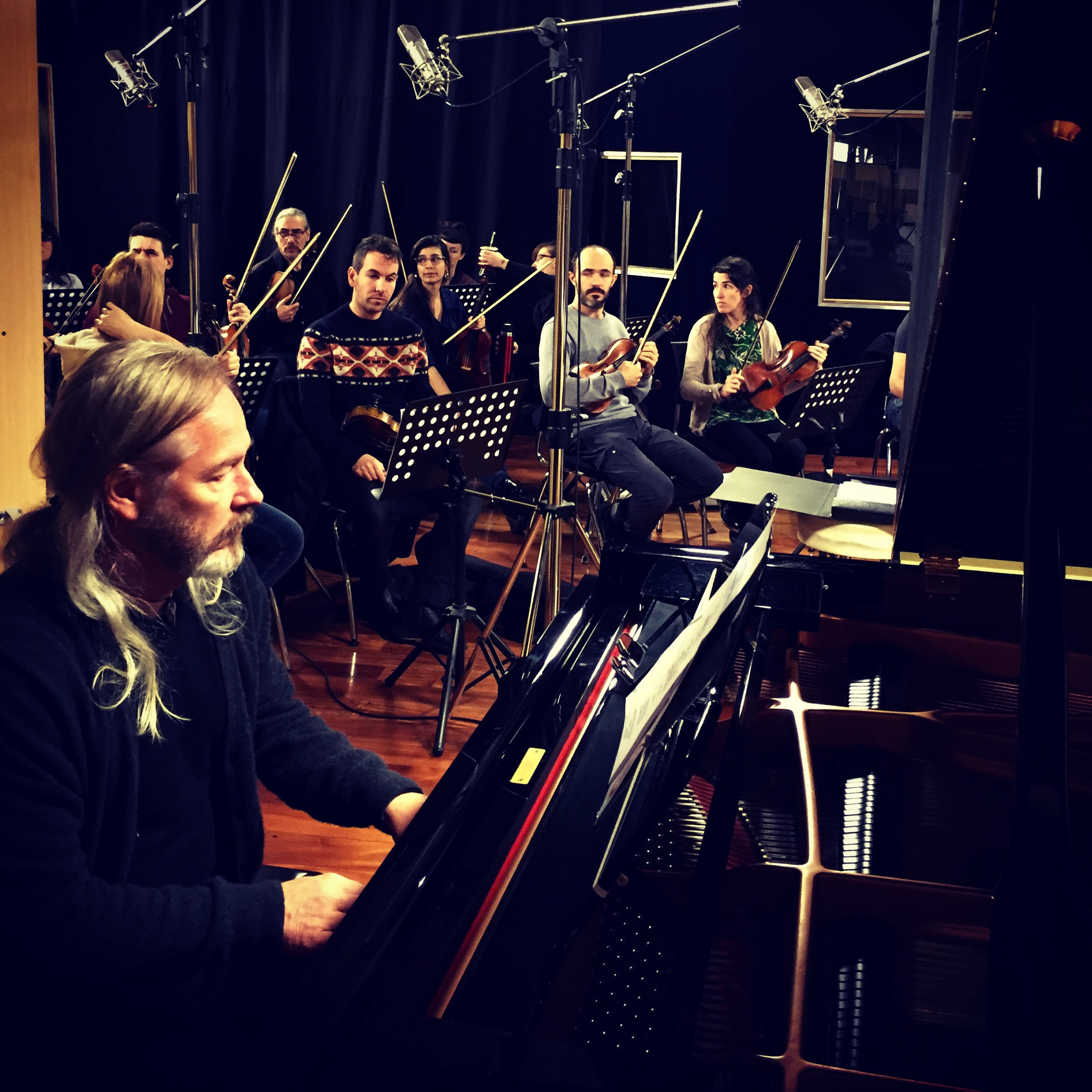 Helmut Ditsch grabando su primer albúm "Del Final de los Tiempos"